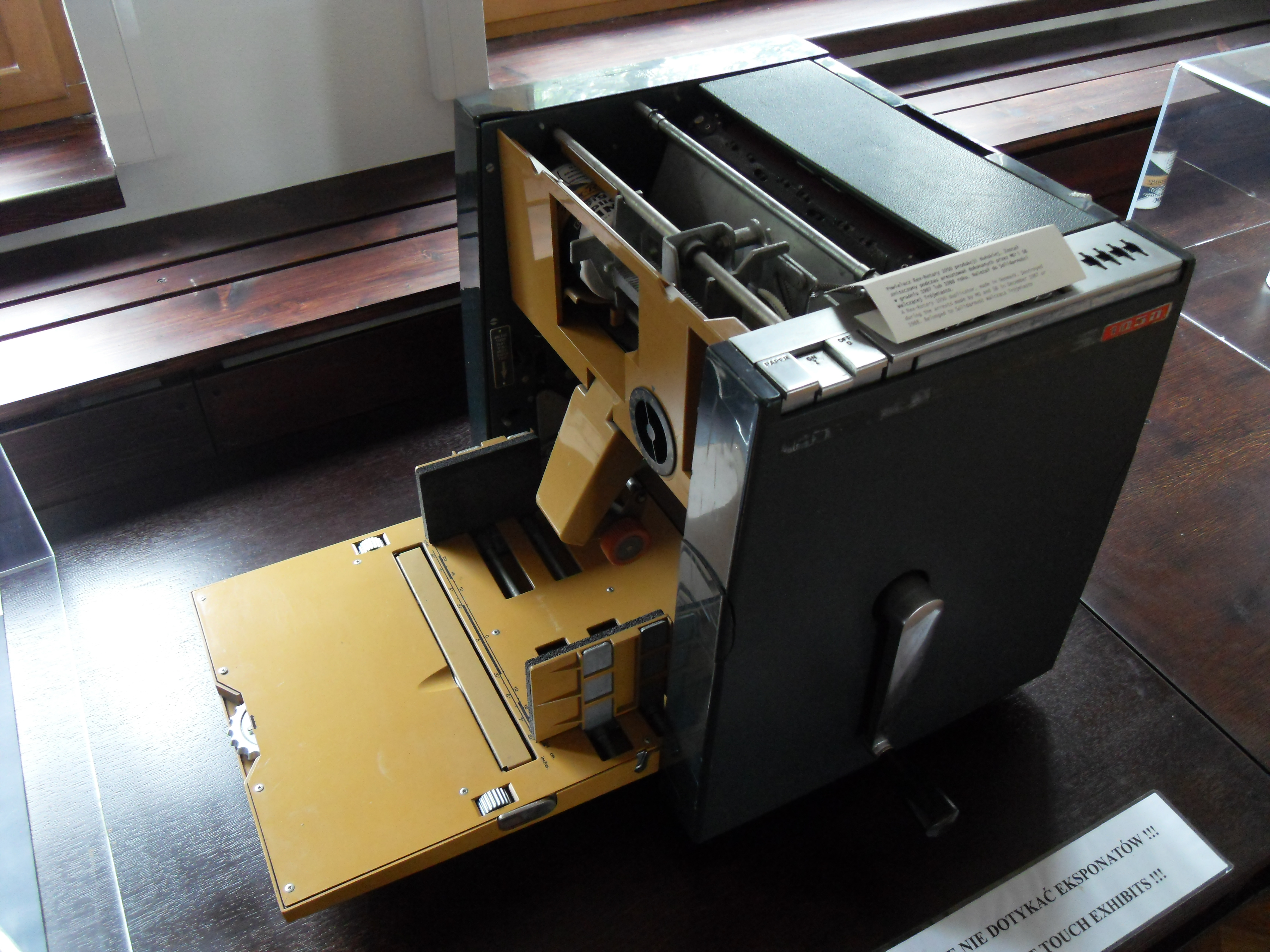 Ekspozycja w sali BHP Stoczni Gdańskiej. Opis z etykiety: "Powielacz Rex-Rotary 1050 produkcji duńskiej. Został zniszczony podczas aresztowań dokonanych przez MO i SB w grudniu 1987 lub 1988 roku. Należał do Solidarności Walczącej Trójmiasto".